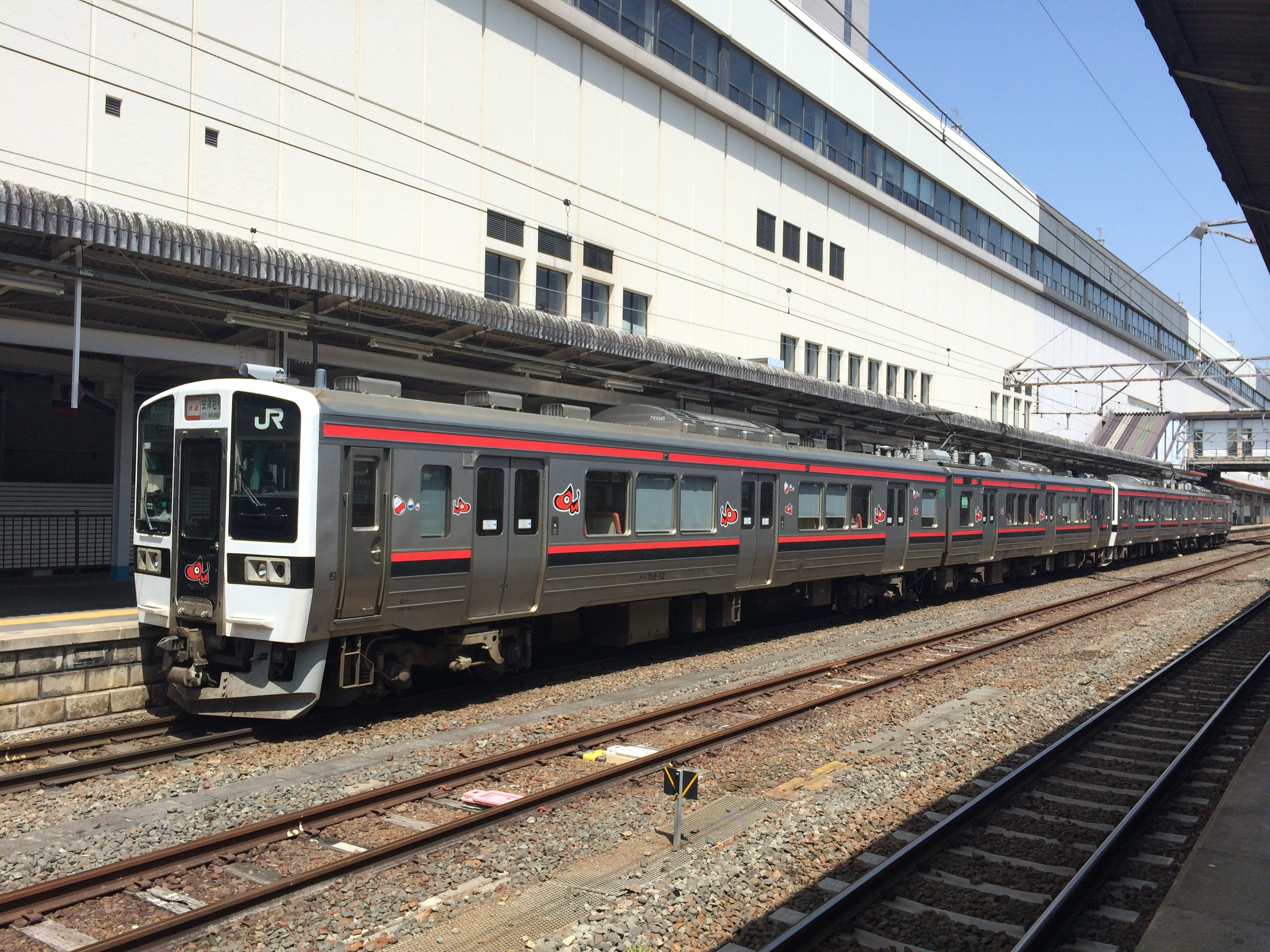 719系磐越西線色